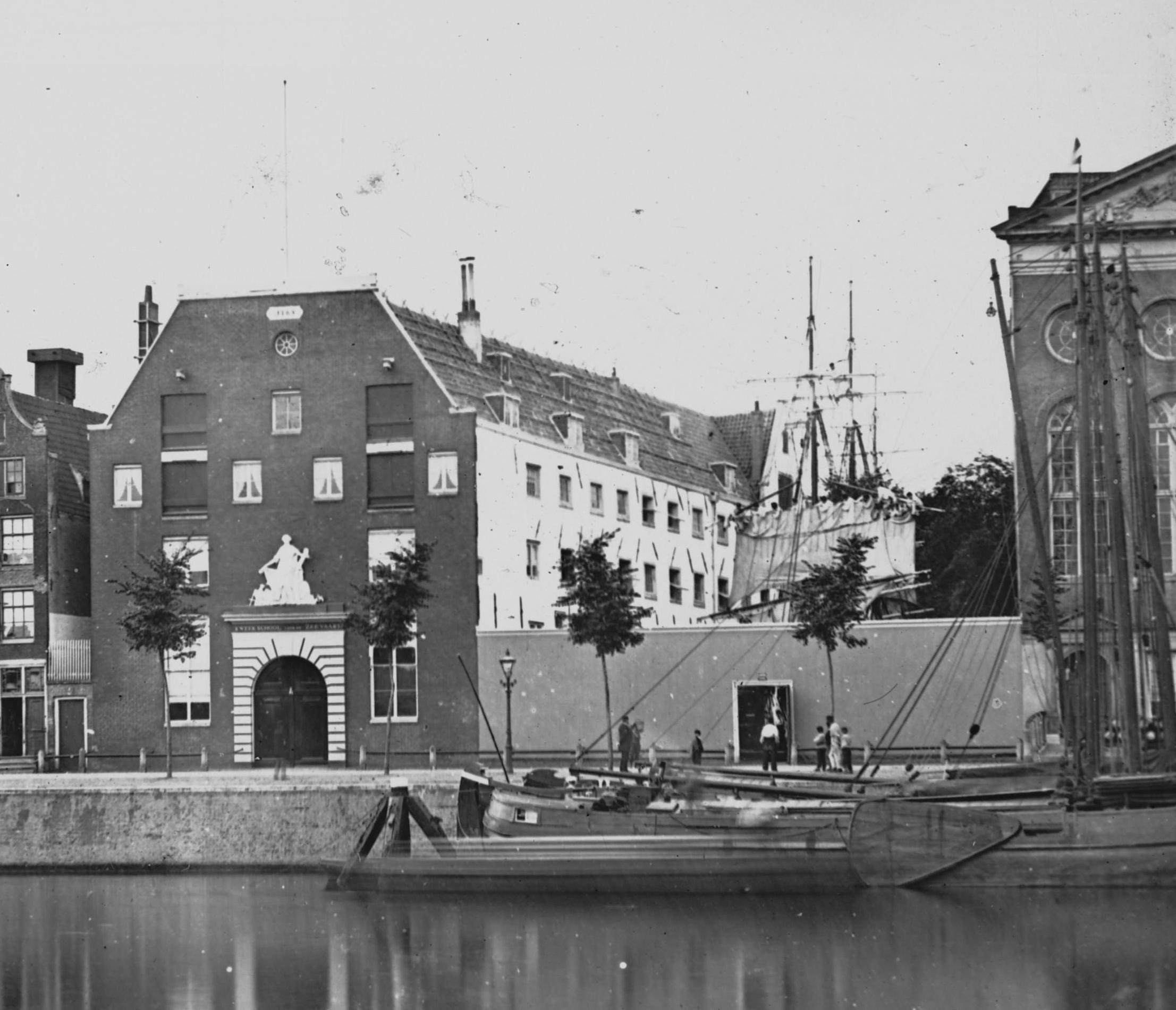 Beschrijving IJgracht 31-35 (v.r.n.l.) met op nummer 31 's Rijks Kweekschool voor de Zeevaart Op deze plaats verrees tussen 1878 en 1880 de nieuwe Kweekschool, Prins Hendrikkade 189 hoek Schippersgracht. Stereosgladia in houten frame. Documenttype foto Vervaardiger Oosterhuis, Pieter Collectie Collectie Stadsarchief Amsterdam: foto-afdrukken Datering 1877 Geografische naam Prins Hendrikkade IJgracht Inventarissen Afbeeldingsbestand ANWI00115000001 Generated with Dememorixer